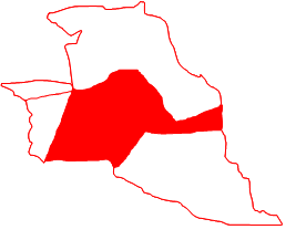 Ubicación de la parroquia Ana María Campos en el municipio Miranda, estado Zulia, Venezuela